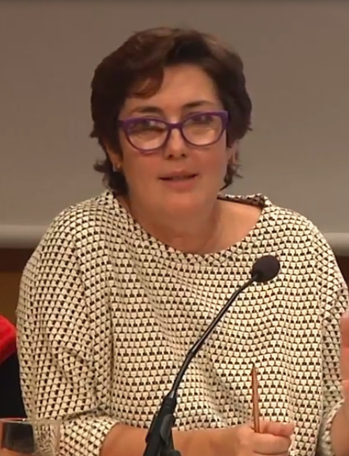 Otras miradas sobre Baroja - Montserrat Domínguez, Enrique Urbizu, MIchel Gaztambide